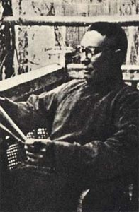 邓玉麟，武昌起义元勋